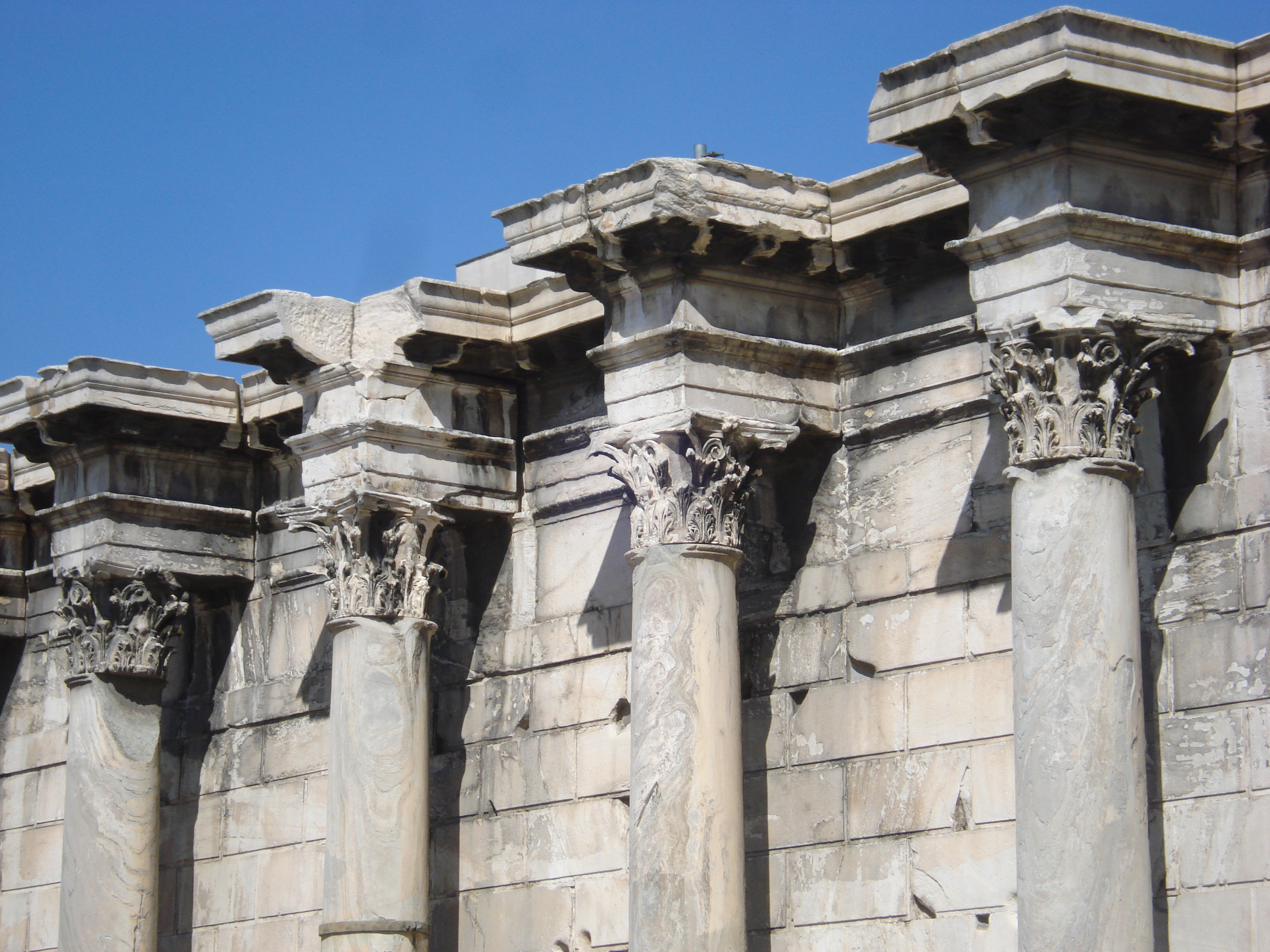 Detall dels capitels corintis de la Biblioteca d'Adrià, a Atenes.